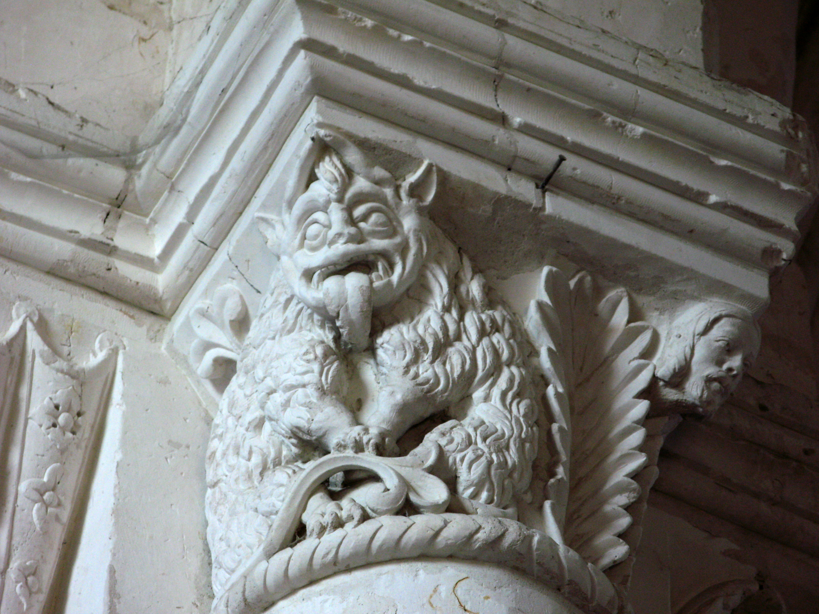 Lucheux (Somme, France) - Détail de l'intérieur de l'église : chapiteau roman. Ce chapiteau (numéroté 1 dans le fascicule de 24 pages diffusé par l'Office de tourisme du Doullennais, Lucheux - Merveilles romanes - Les Chapiteaux de l'église Saint-Léger) représente un monstre et une tête d'homme. On remarque aussi que l'astragale (petite moulure en forme de boudin entre le chapiteau et la colonne) a un motif décoratif simple, une torsade. . Il est très vraisemblable que le chapiteau représente une allégorie d'un des 7 péchés capitaux, la grourmandise. En effet, l'animal monstrueux est un ours, figure symbolique traditionnelle de la gloutonnerie dans l’iconographie chrétienne. L'animal a un pelage manifestement très épais, il tire la langue exagérément, et son corps est particulièrement gros, voire obèse. Il est équipé de cornes - un des attributs du diable - qui se rejoignent au-dessus de sa tête. Ses pattes avant reposent sur une fleur de lys. Une autre fleur de lys est représentée en haut à gauche. A sa droite, une large palme se dresse, au-delà de laquelle surgit l'élégant visage d'un homme jeune et barbu (le Christ ?).